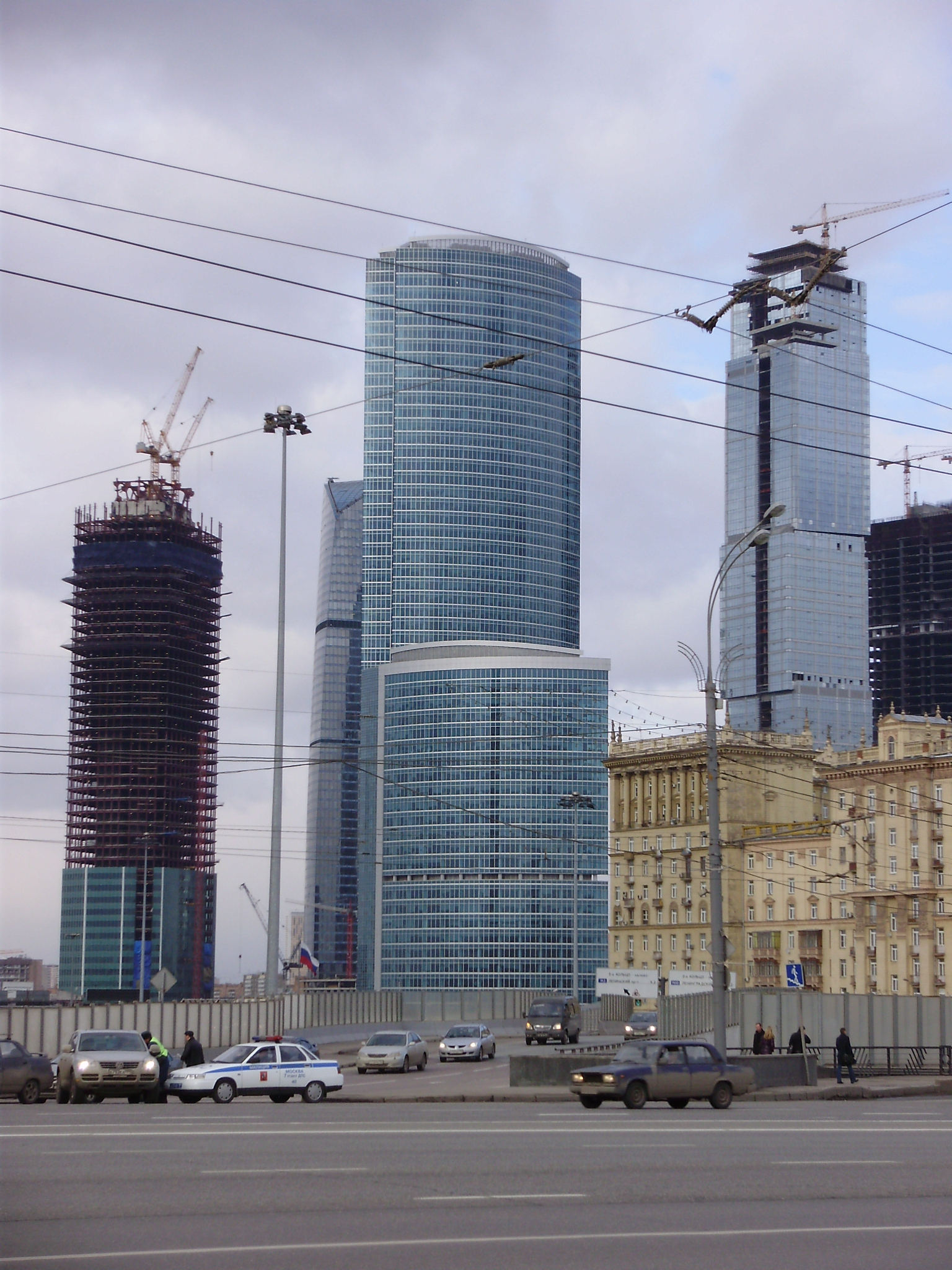 Вид на деловой центр Москва-сити с Кутузовского проспекта